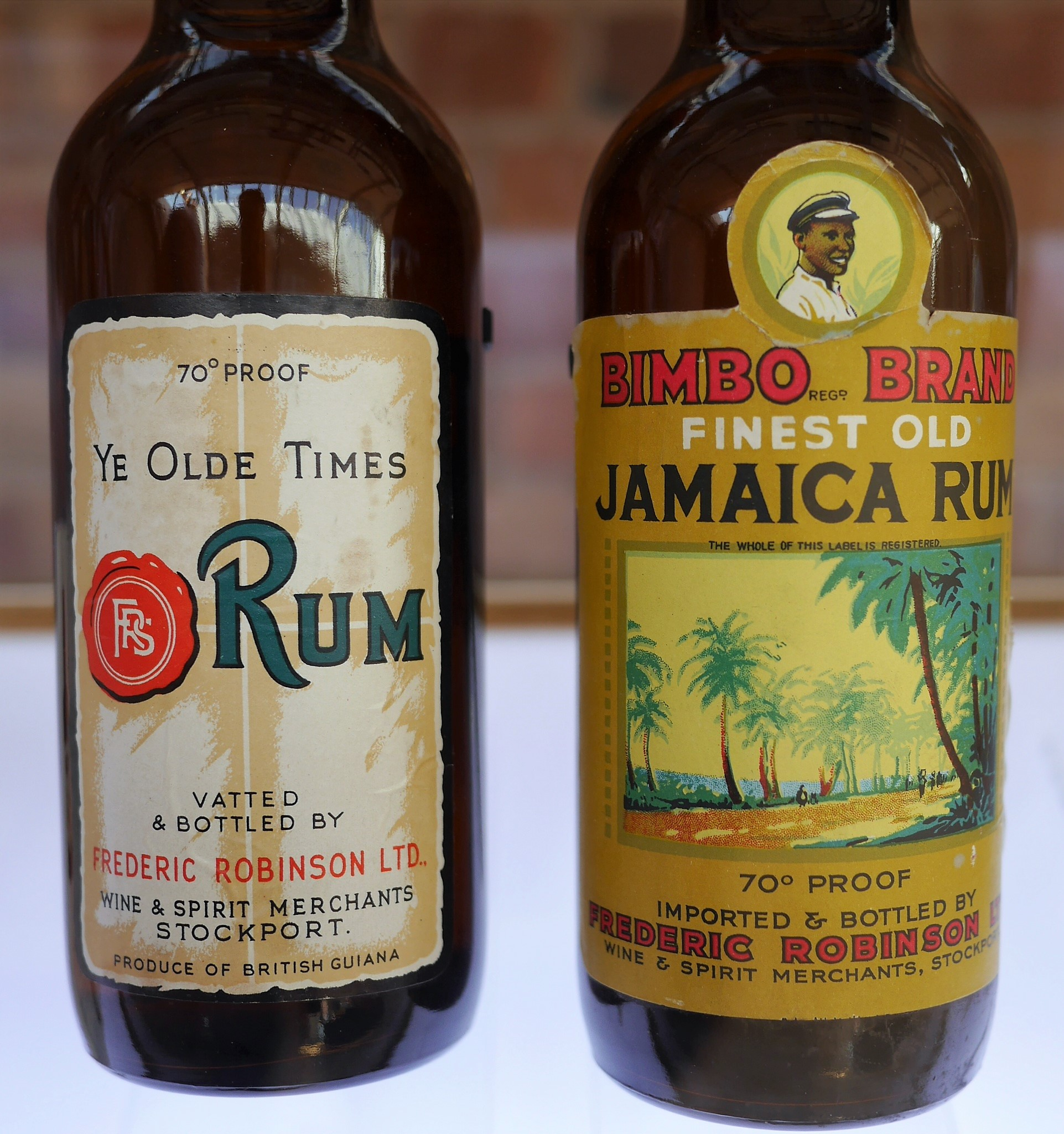 Zwei "alte" Flaschen Rum (aus Guyana und Jamaika) des englischen Spirituosenherstellers Frederic Robinson Ltd. in Stockport, England.